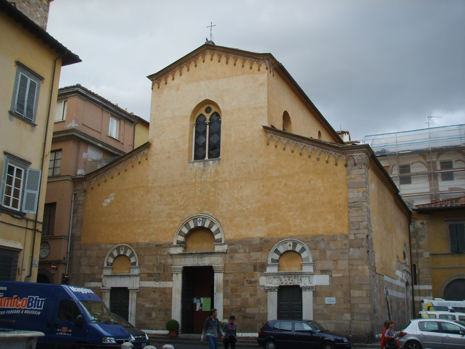 Chiesa di san salvatore, lucca